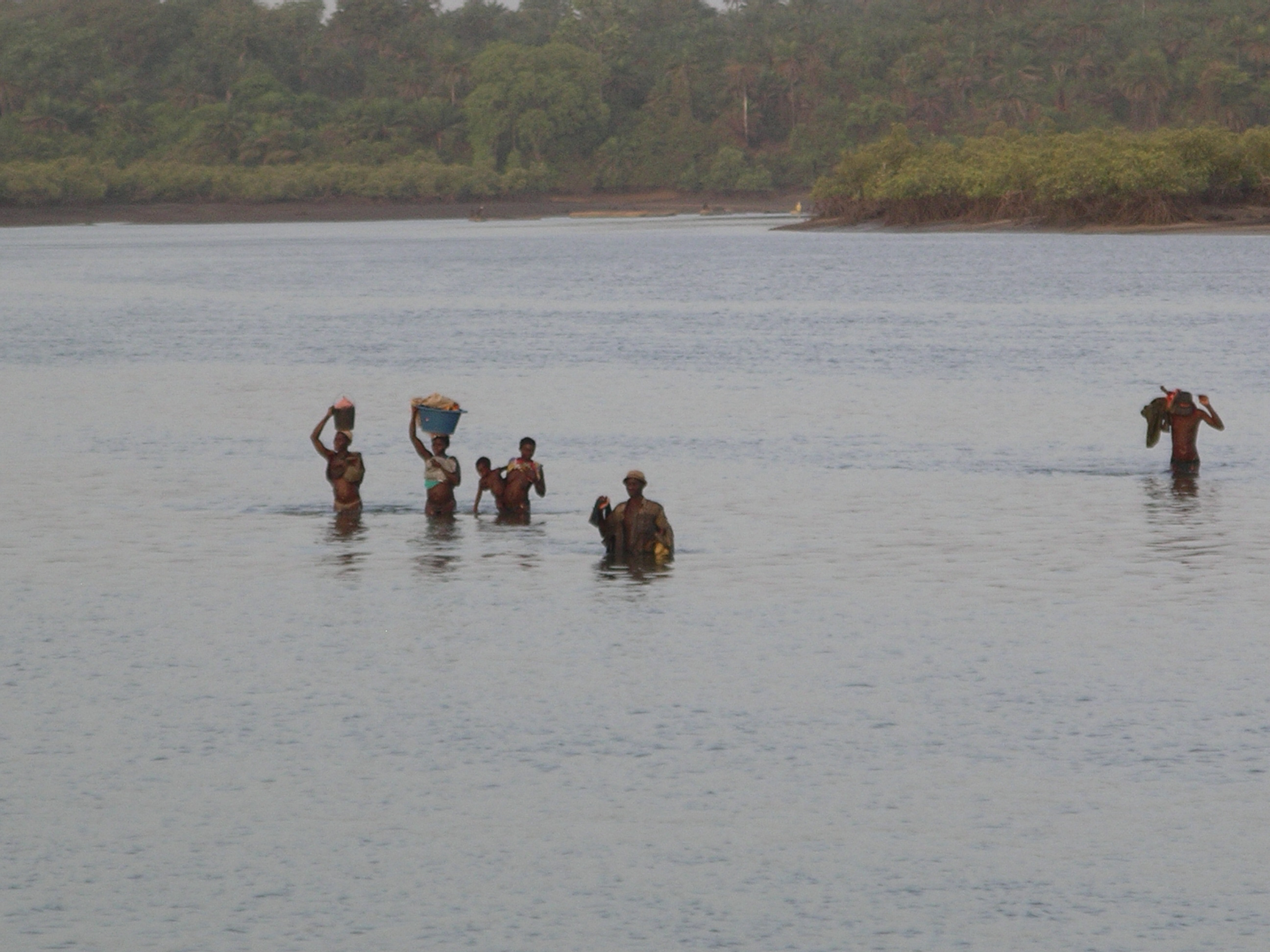 Cruzando o rio durante a maré baixa na Guiné-Bissau.